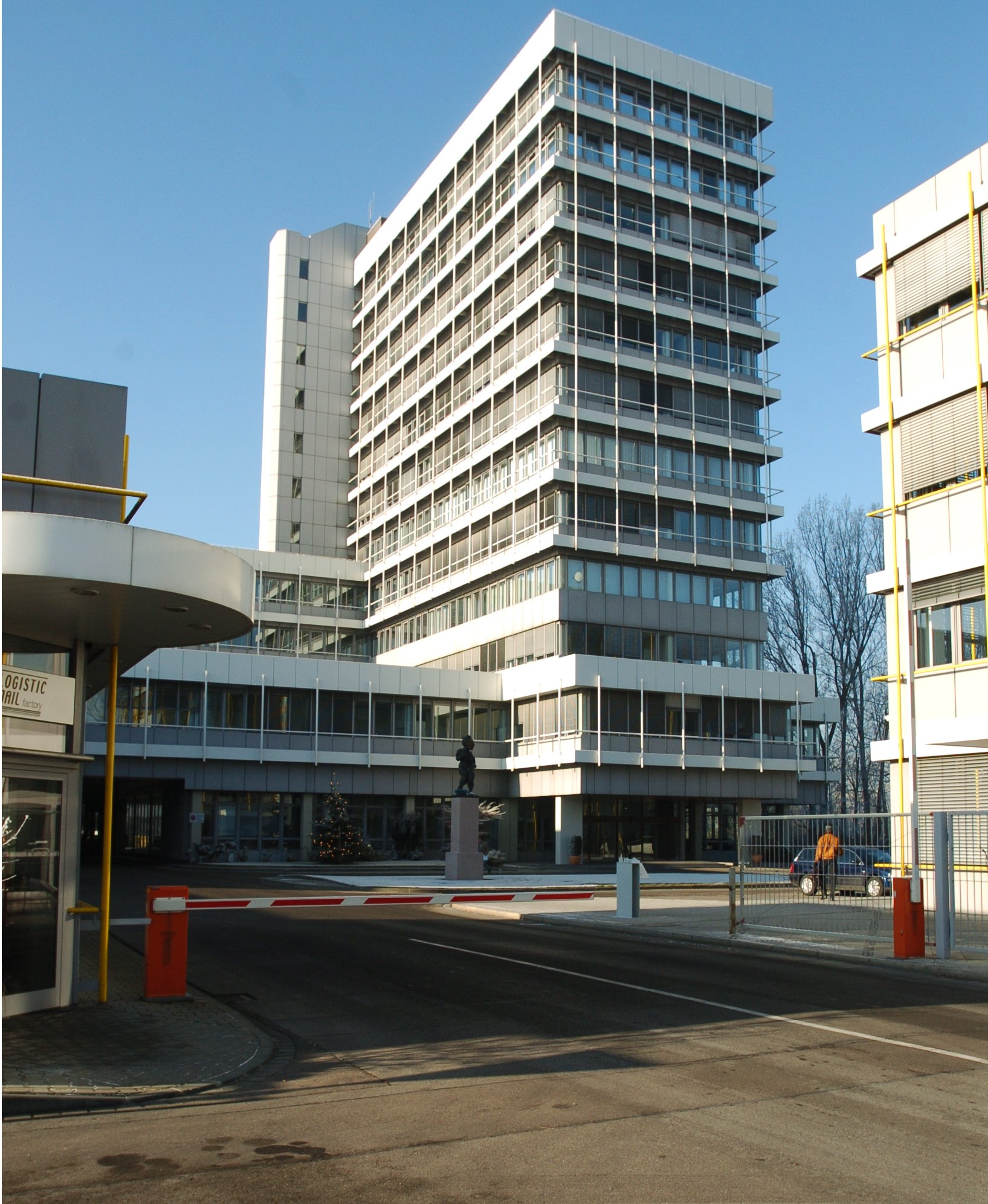 Ansicht des Verlagsgebäudes der Augsburger Allgemeinen